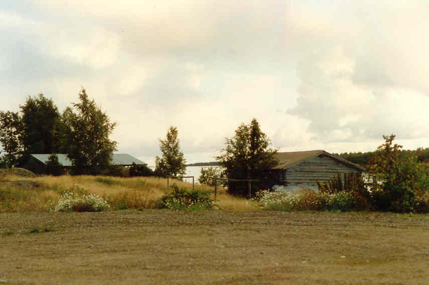 Strandlinjen i Skaftung, sommaren 1990. En bild tagen av Harri Blomberg.